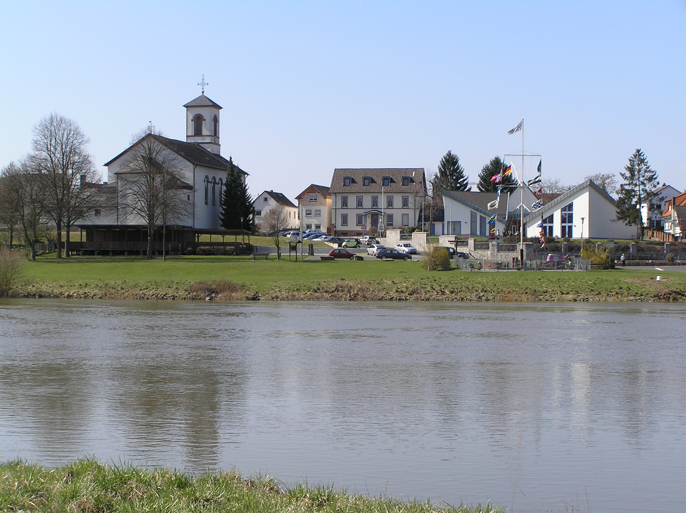 Blick von Karlstein-Dettingen (Kreis Aschaffenburg) auf den Mainhäuser Ortsteil Mainflingen mit Kirche St. Kilian, Pfarrhaus und Kilianushaus